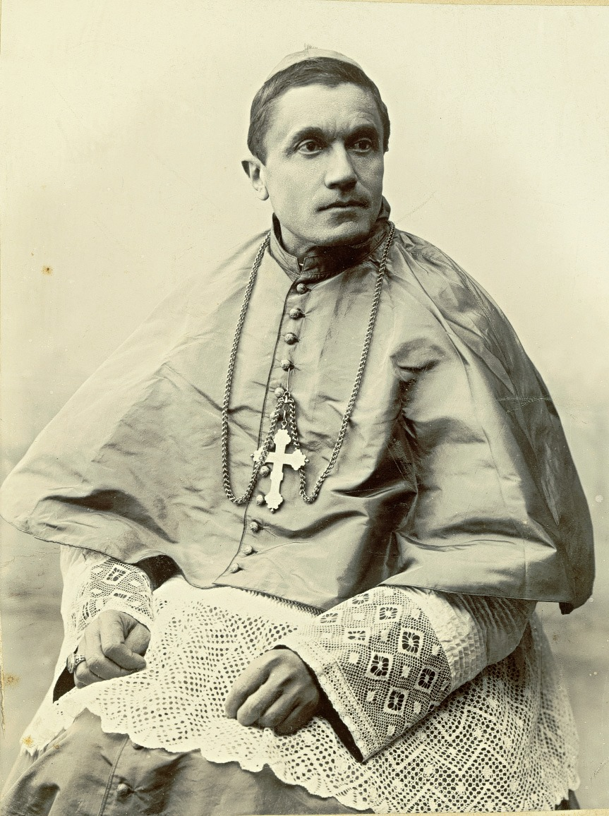 Vescovo Luigi Pellizzo